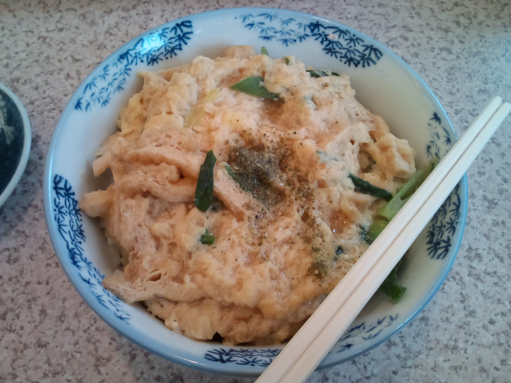 「衣笠丼」わかるかな？ 店の名前は失念